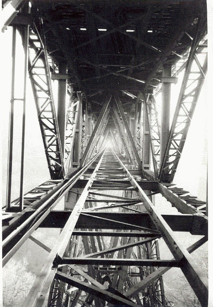 Das Innere des Hauptträgers der Müngstener Brücke